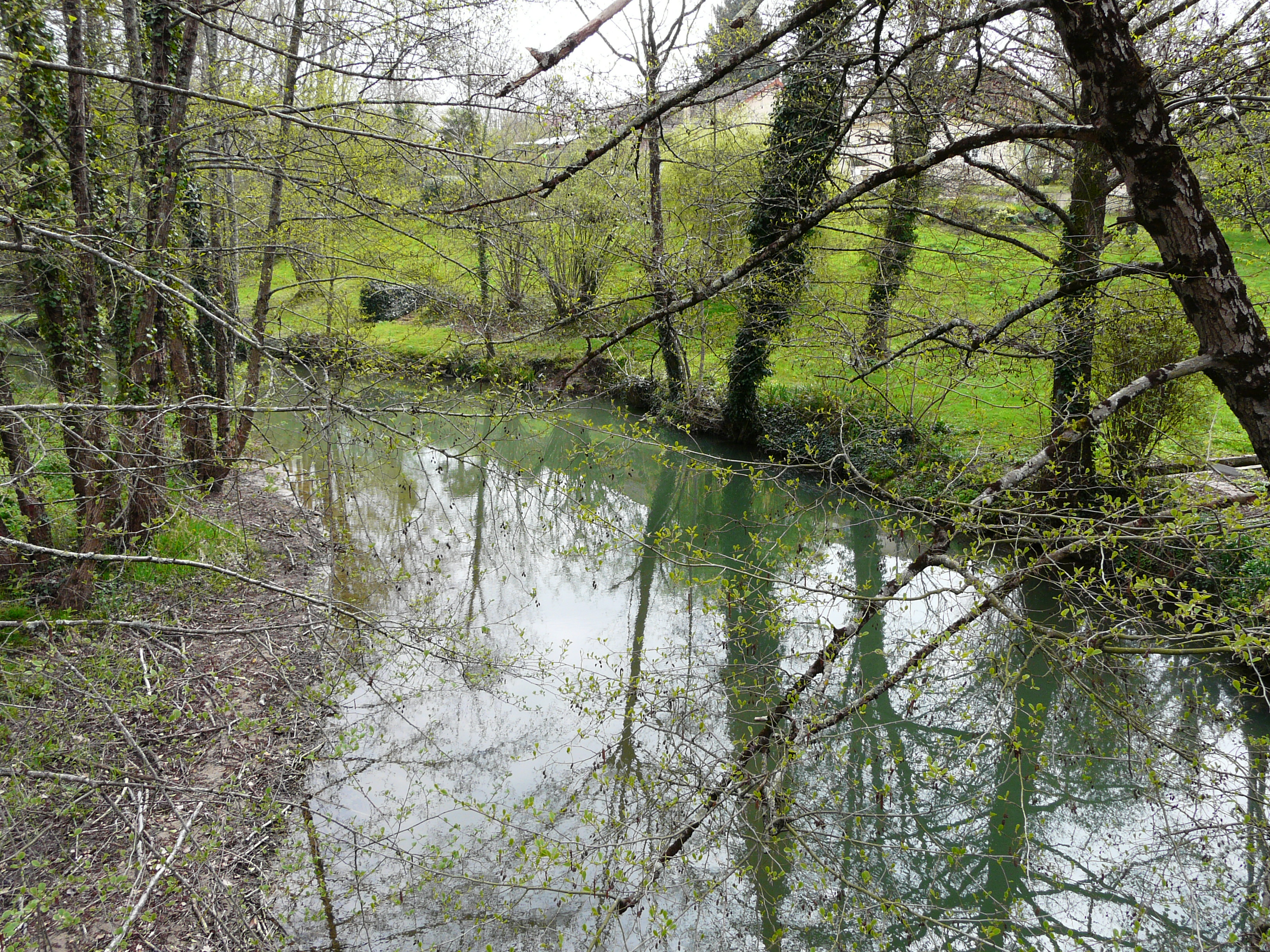 Le ruisseau de la Conne en amont du pont de la route départementale 37, Bergerac, Dordogne, France.